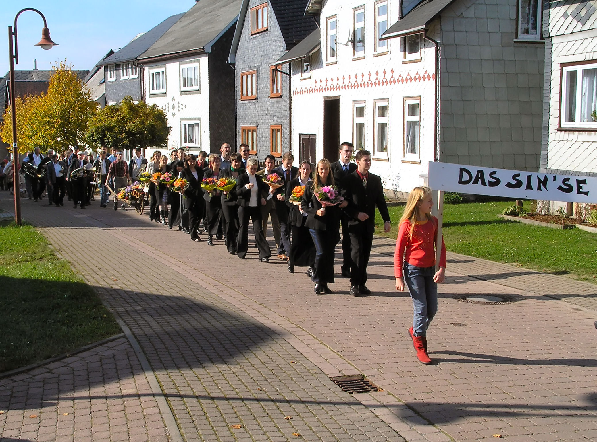 Kärmsenumzug in Böhlen